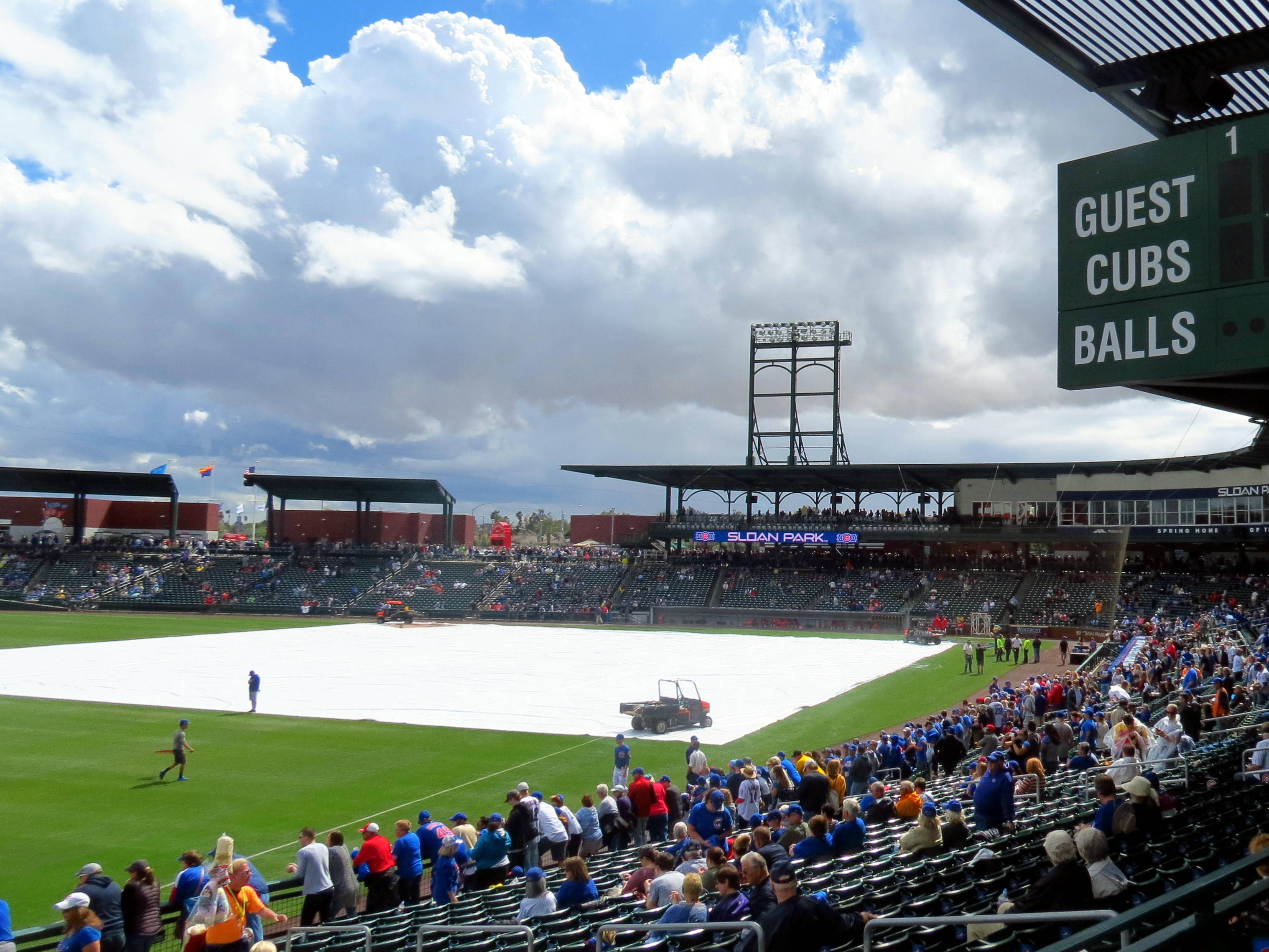 Los Angeles Angels at Chicago Cubs